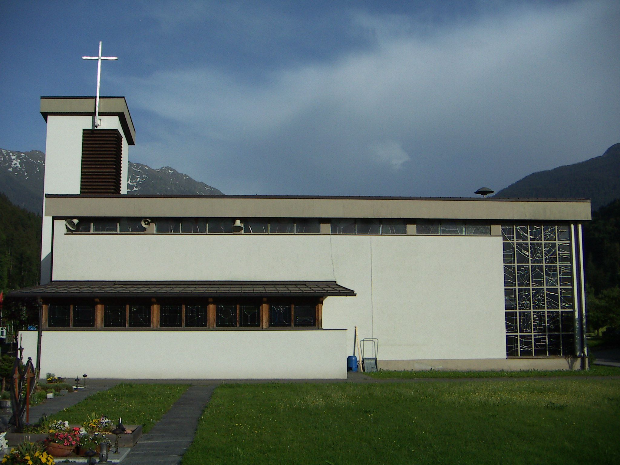 Pfarrexpositurkirche Hl. Josef der Arbeiter, Ortsteil Gantschier, Bartholmäberg